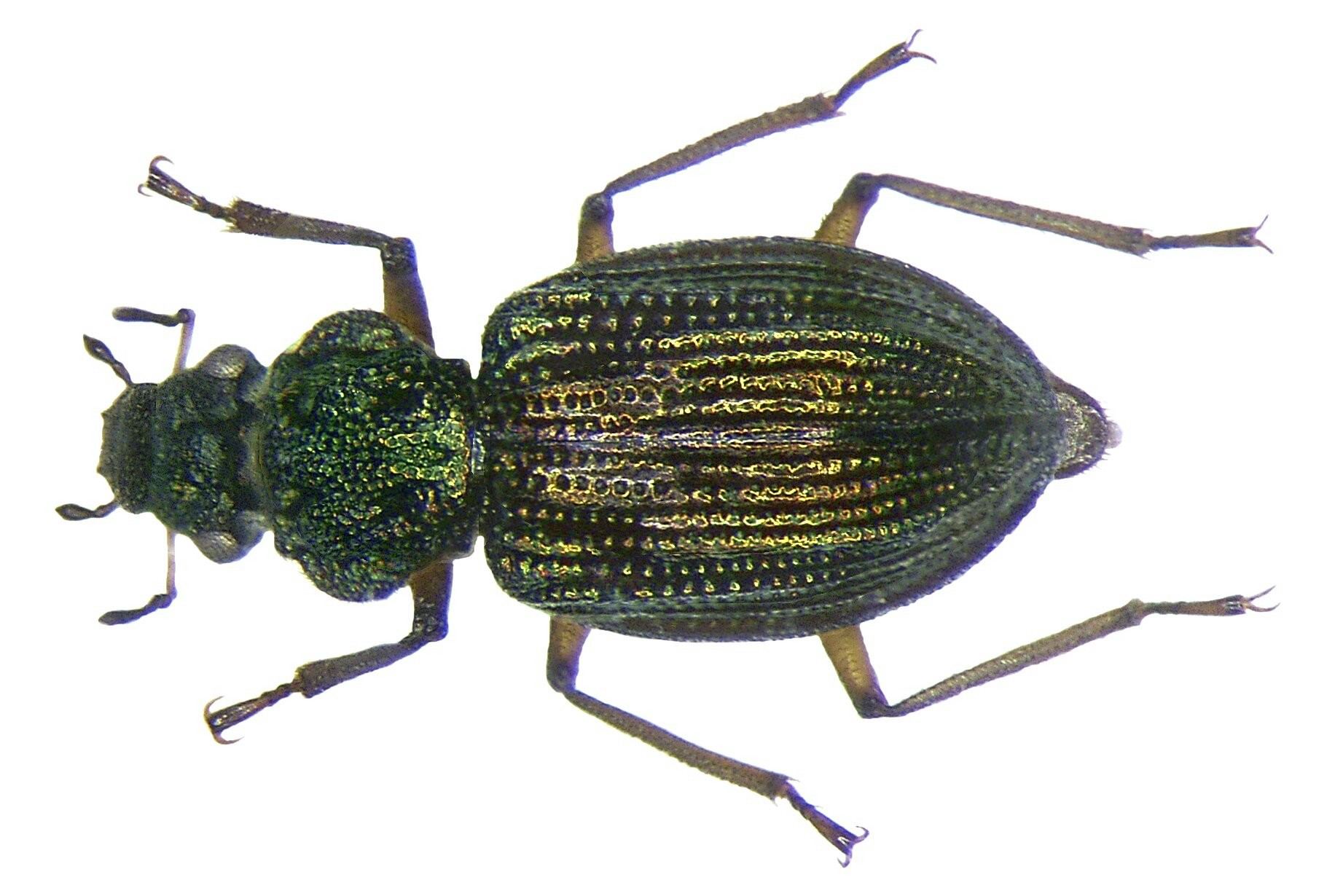 Familie: Hydraenidae Grösse: 2,6-3 mm Verbreitung: Europa Ökologie: im Moos der Gebirgsbäche Fundort: Germania, Oberbayern, Oberstdorf, 1000 m leg.det. U.Schmidt, 2005 Foto: U.Schmidt, 2007